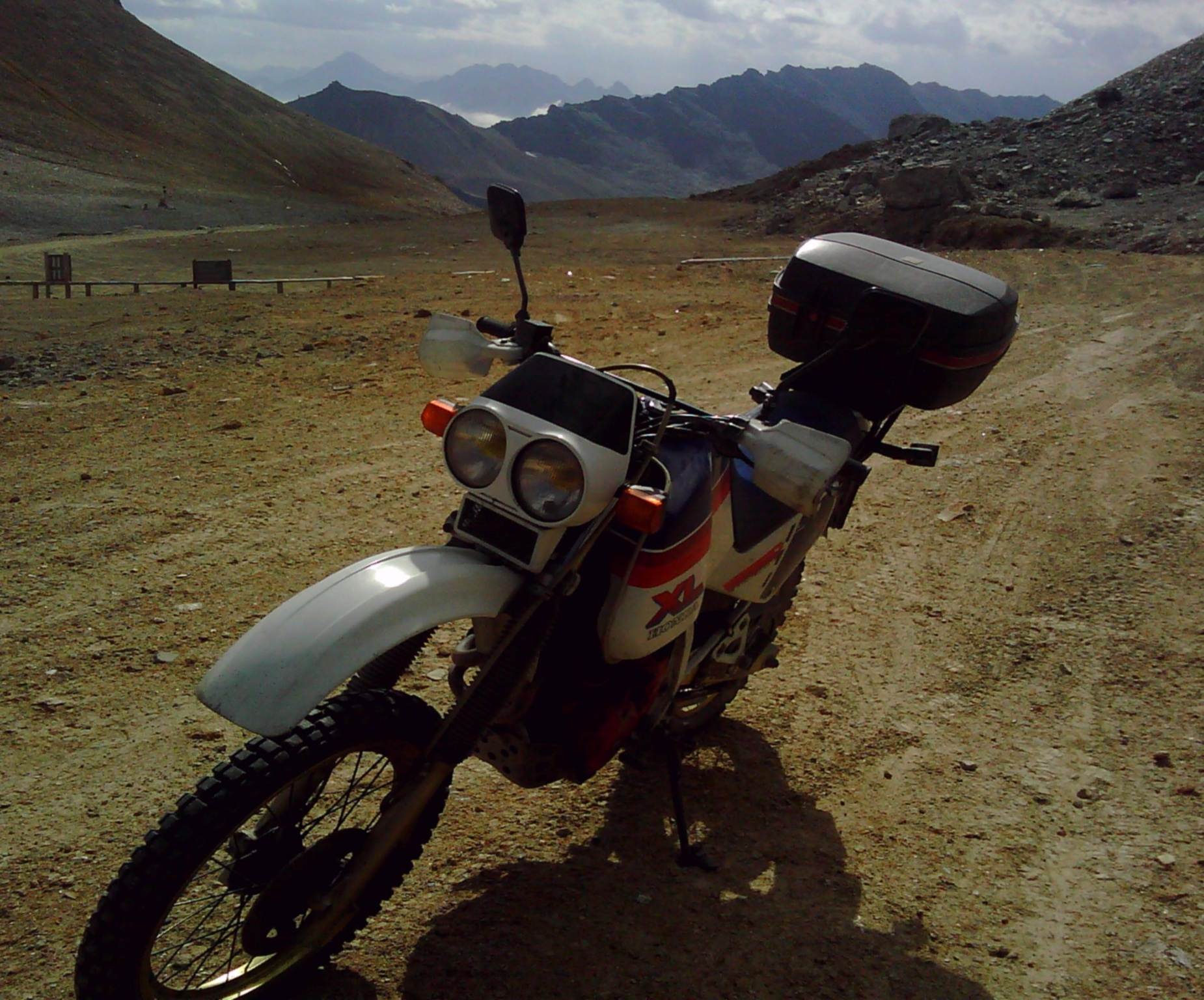 Foto scattata alla fine della strada militare del Colle del Sommeiller (c.ca 3000 metri s.l.m.)